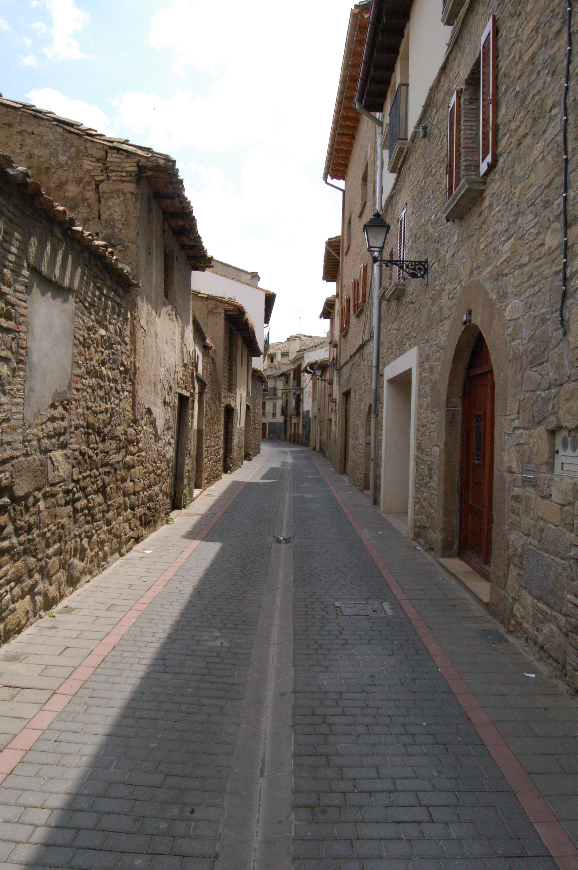 Calle de la ciudad de Sangüesa (Navarra-España)